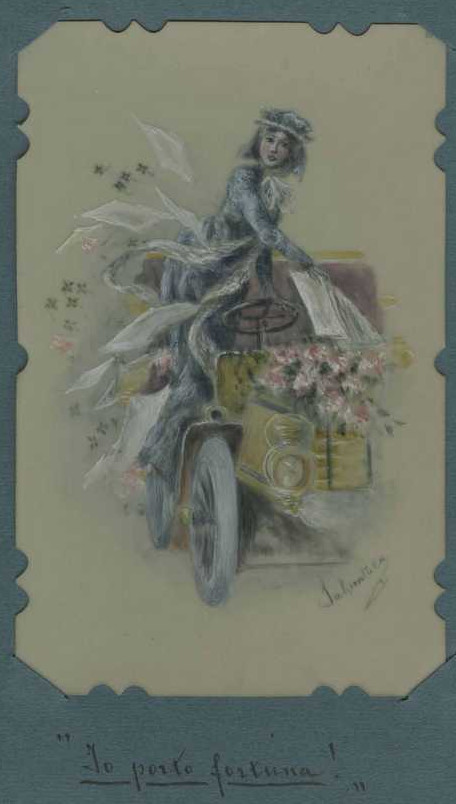 Immagine tratta dalla rivista